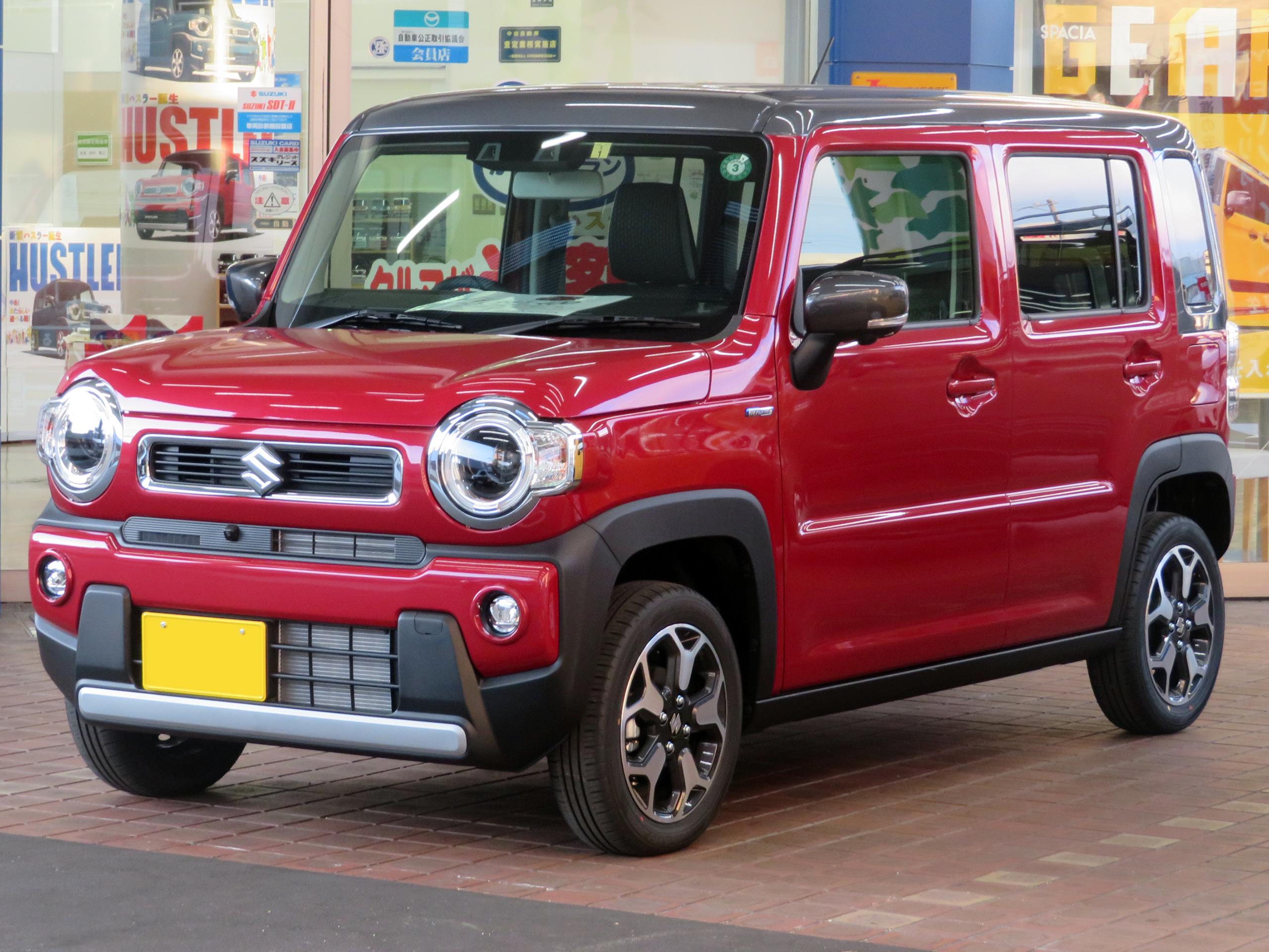 4AA-MR52S-HTXB-JN型スズキ・ハスラーHYBRID Xターボ2WDをフロントから撮影。